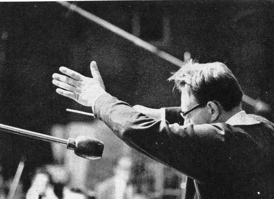 Maurice Le Roux dirigeant Turangalîla-Symphonie d'Olivier Messiaen